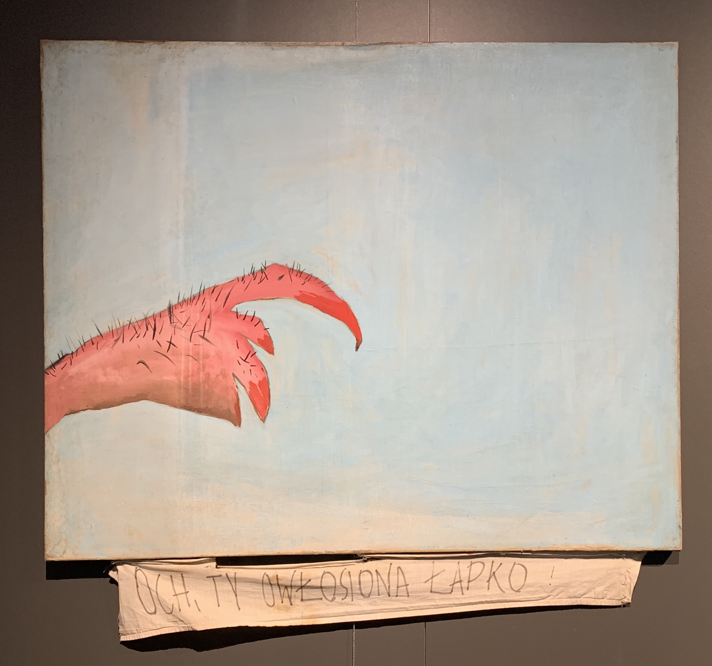 1982, olej na płótnie, 80 x 100 cm